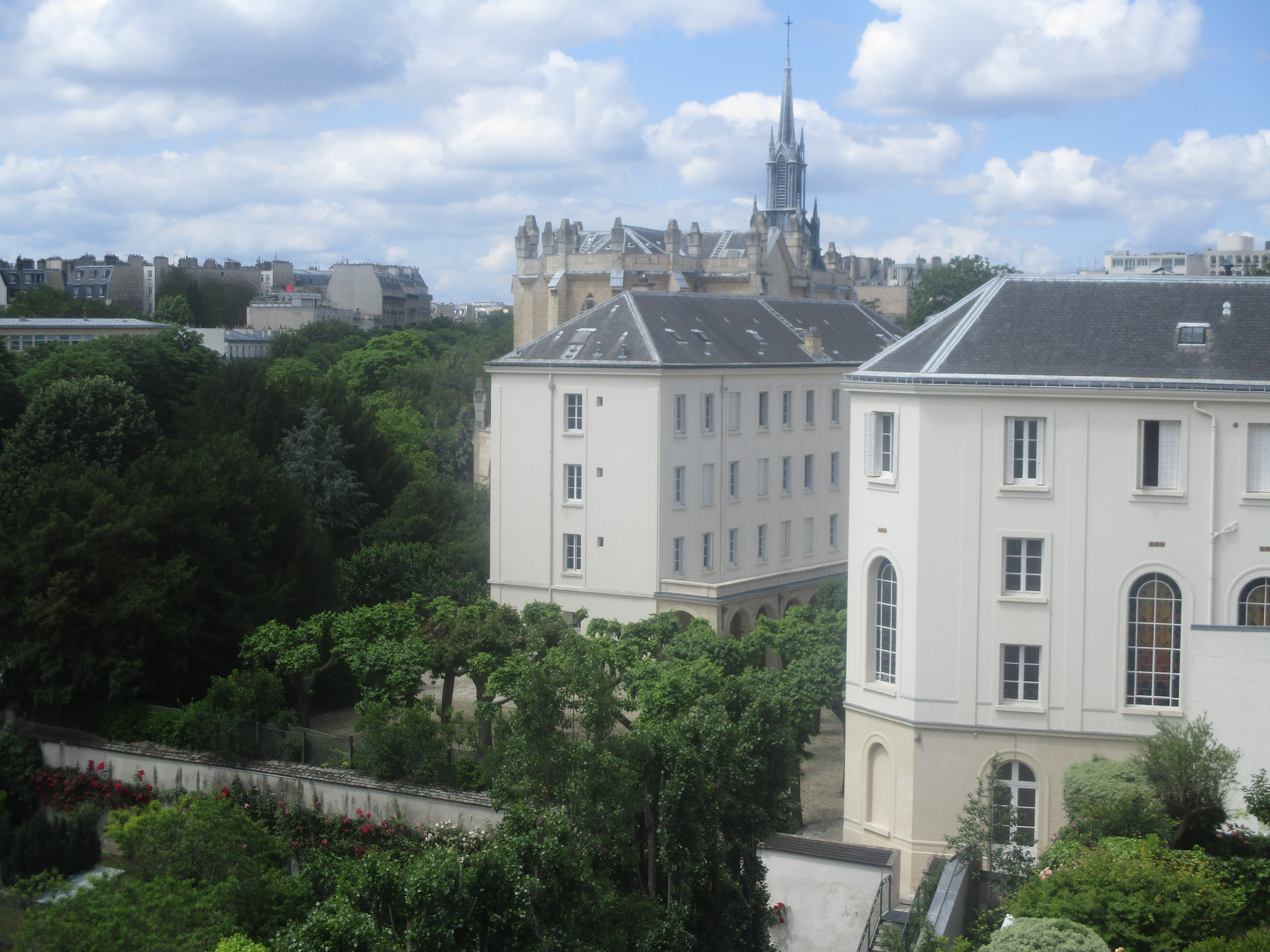 Maison-mère des Sœurs de Saint Joseph de Cluny, 21 rue Méchain, Paris.